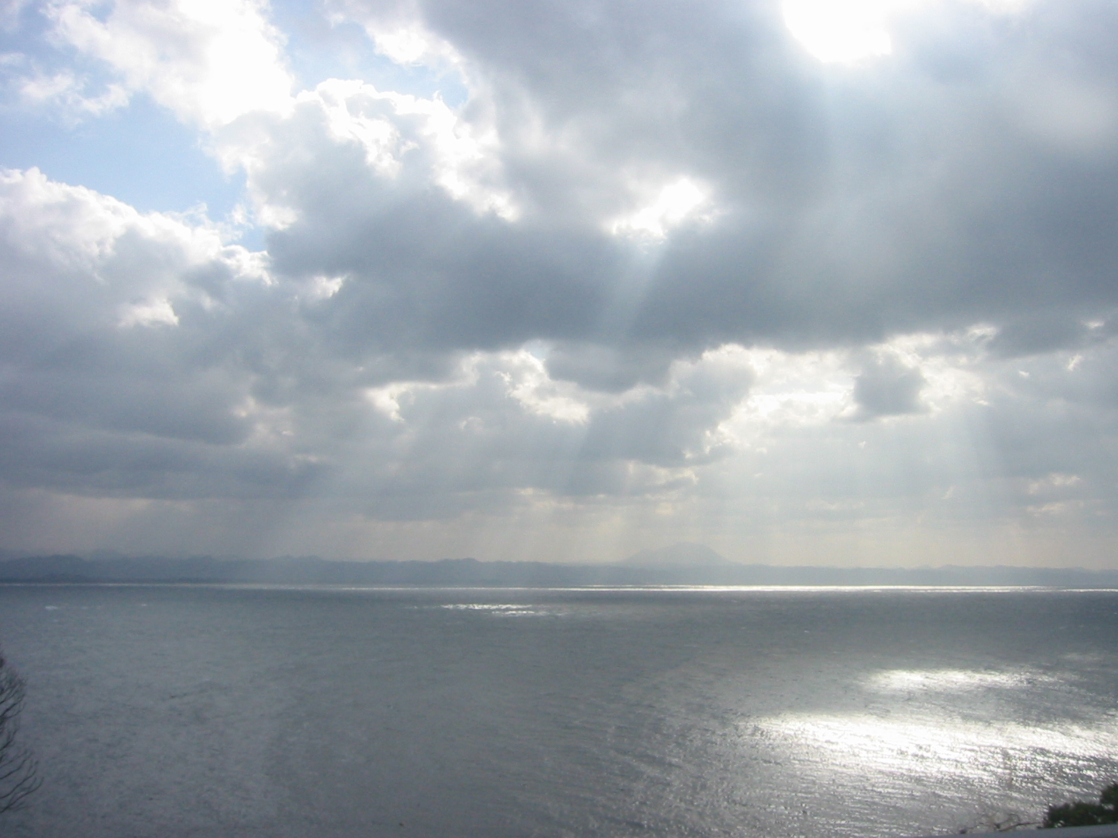 日御碕 赤石鼻付近?から望む日本海 大田市方面 バスから